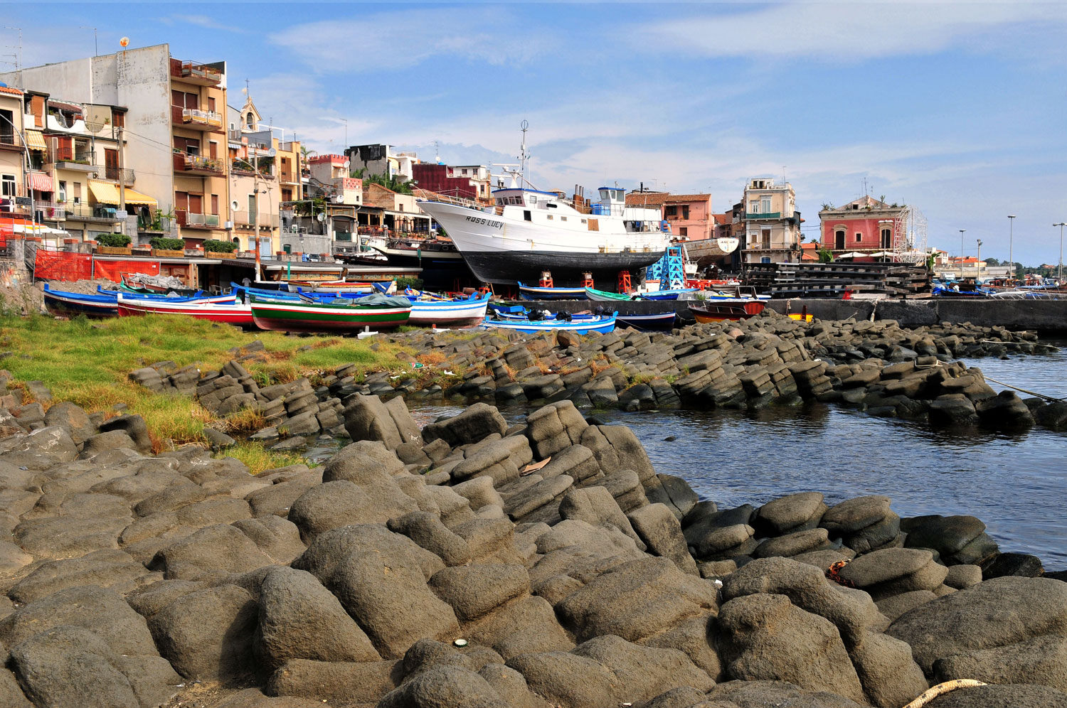 La "spiaggia dei Malavoglia"